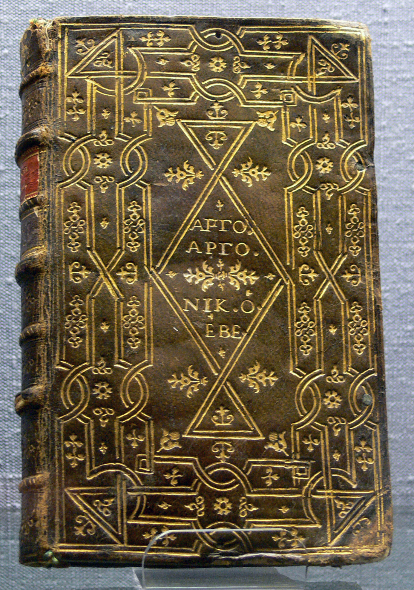 Bucheinband einem Buch des Druckers Aldus Manutius („Aldine“), Venedig 1521 (griechischer Urtext der Argonautica); braunes Maroquinleder über Papper, gepresst, teilvergoldet Kunstgewerbemuseum Berlin, Ankauf aus dem Kunsthandel, Inv. Nr. 1890,384